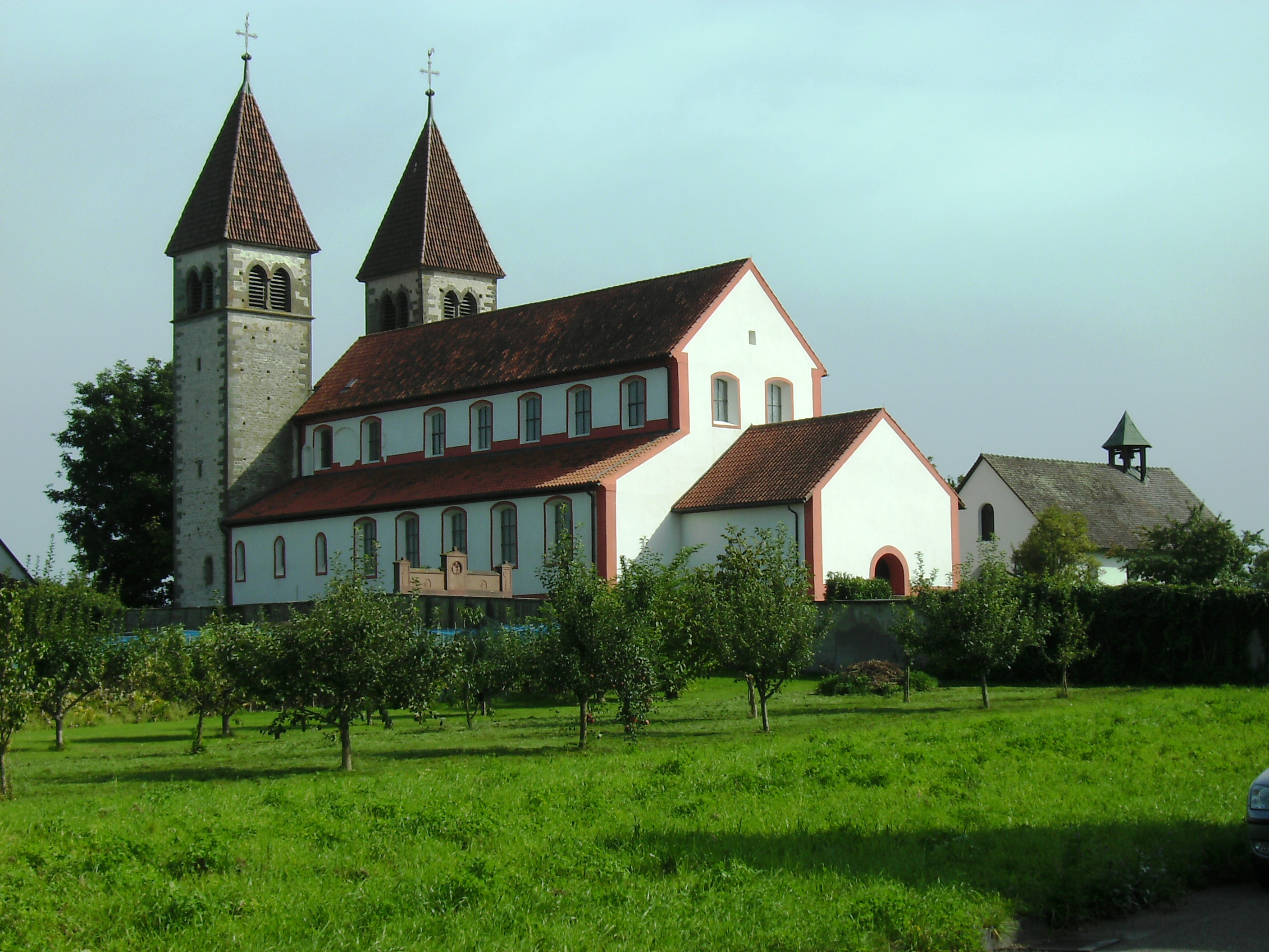 Stiftskirche St. Peter und Paul auf der Insel Reichenau